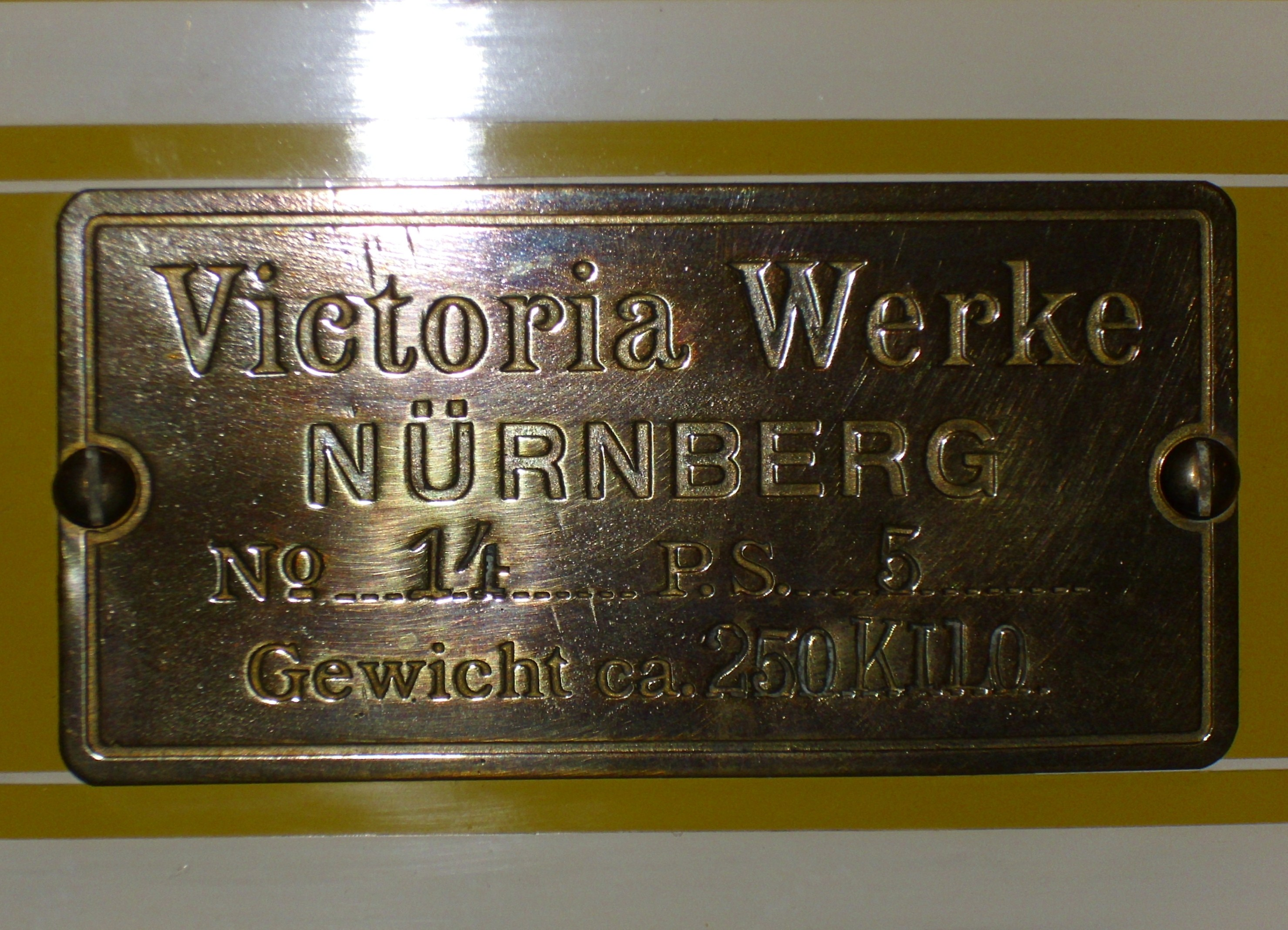 Emblem Victoria